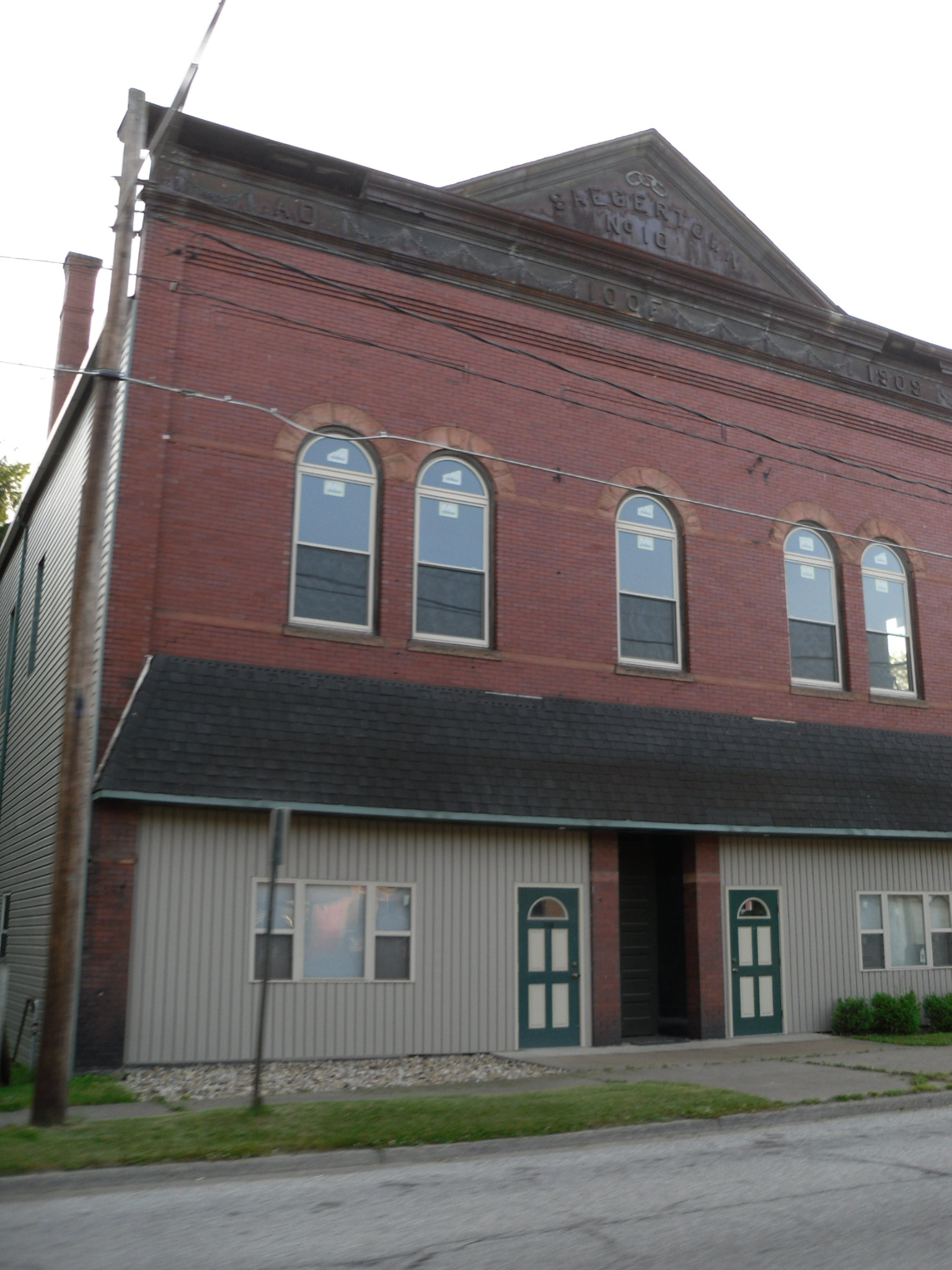 Saegertown, Pennsylvania